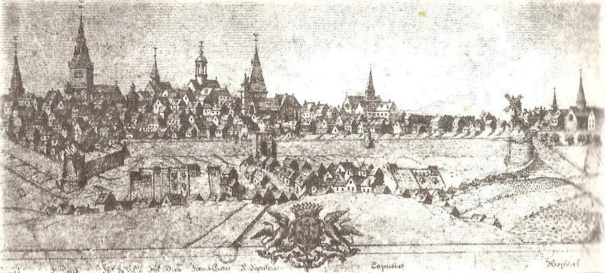 Vue ancienne de Montdidier (gravure anonyme, 1740) 1